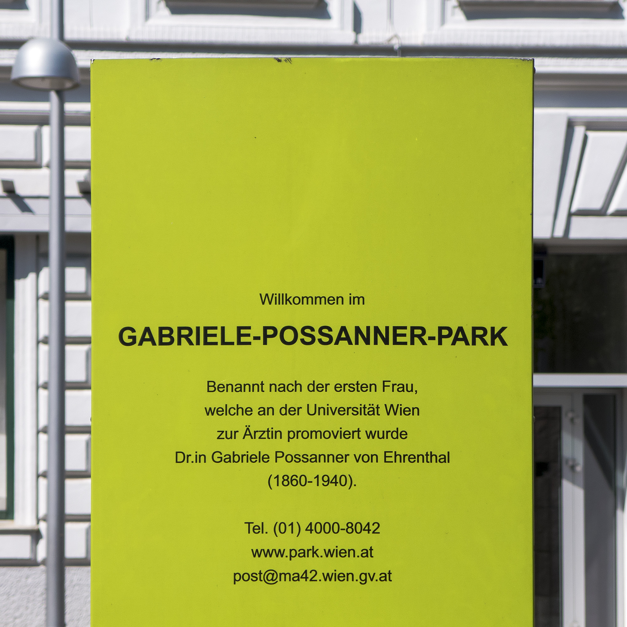 Gabriele-Possanner-Park in Wien 9